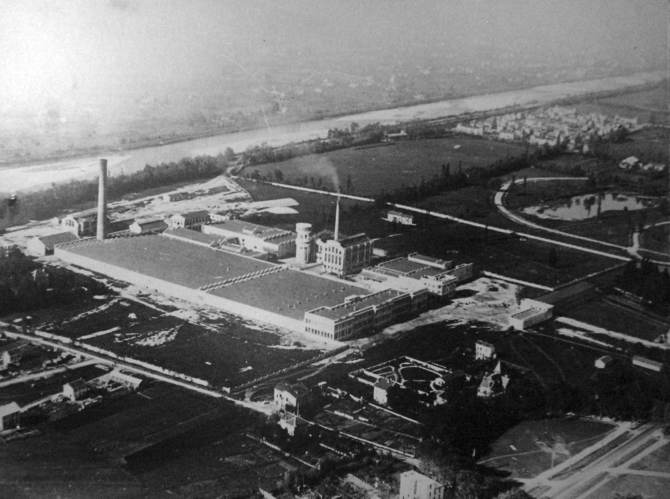 Image aérienne du Musée de la viscose (Échirolles) du 1928. Reproduction exposée au Musée de la viscose, Échirolles, Isère, France.